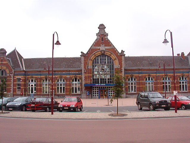 Photo personnelle prise par ghostal le 12 juillet 2005